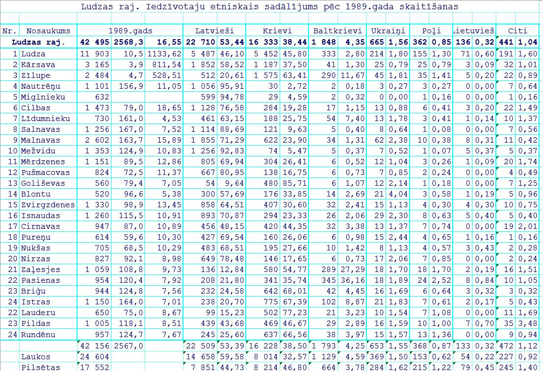 Этнический состав населения Латвии по переписи 1989 года